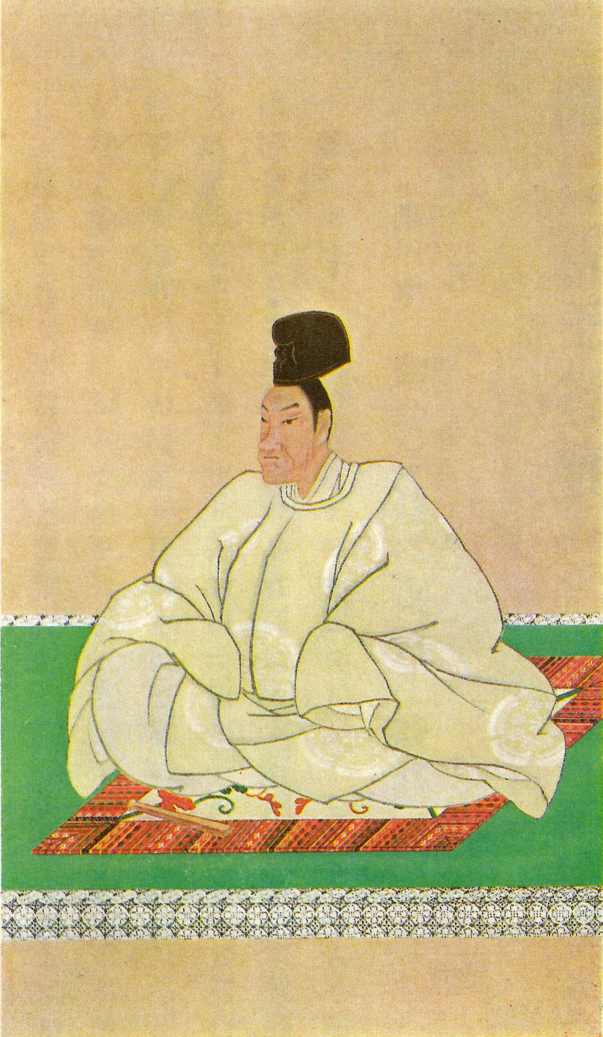 有栖川宮韶仁親王の肖像。